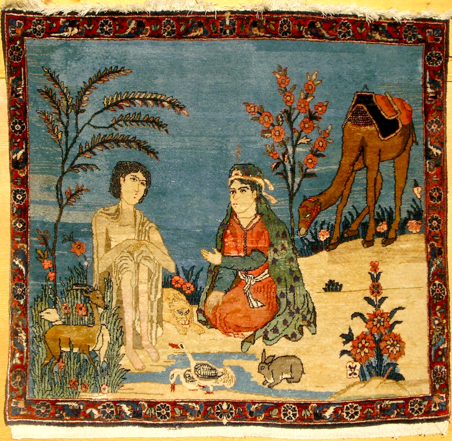 Keshan carpet, "Leila en Madschnun"